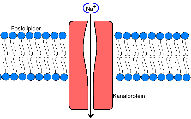 Skisse av et kanalprotein i en fosfolipidmembran